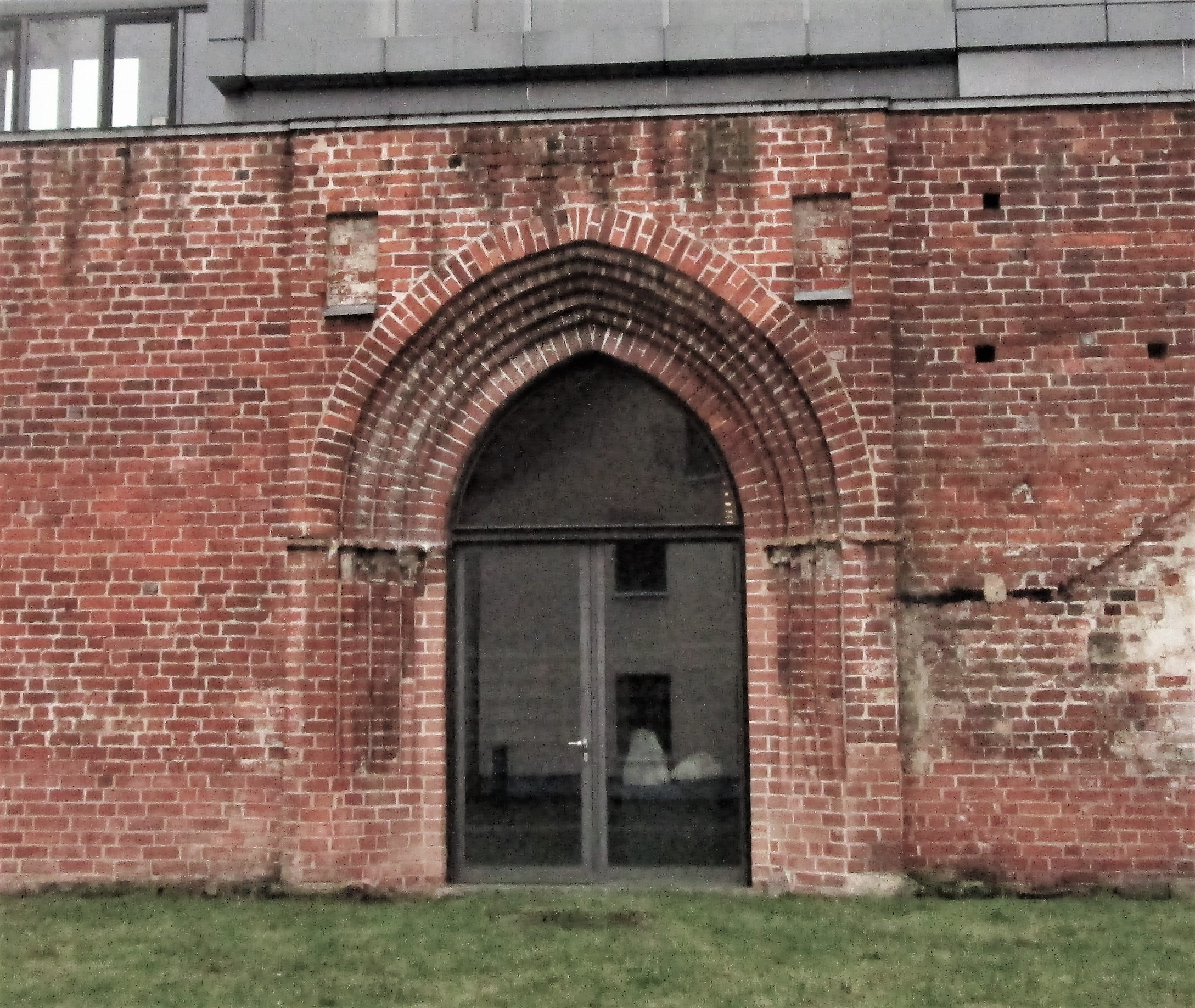 Hochschule für Musik und Theater Rostock - Westwand mit dem Eingangsportal des Franziskanerklosters